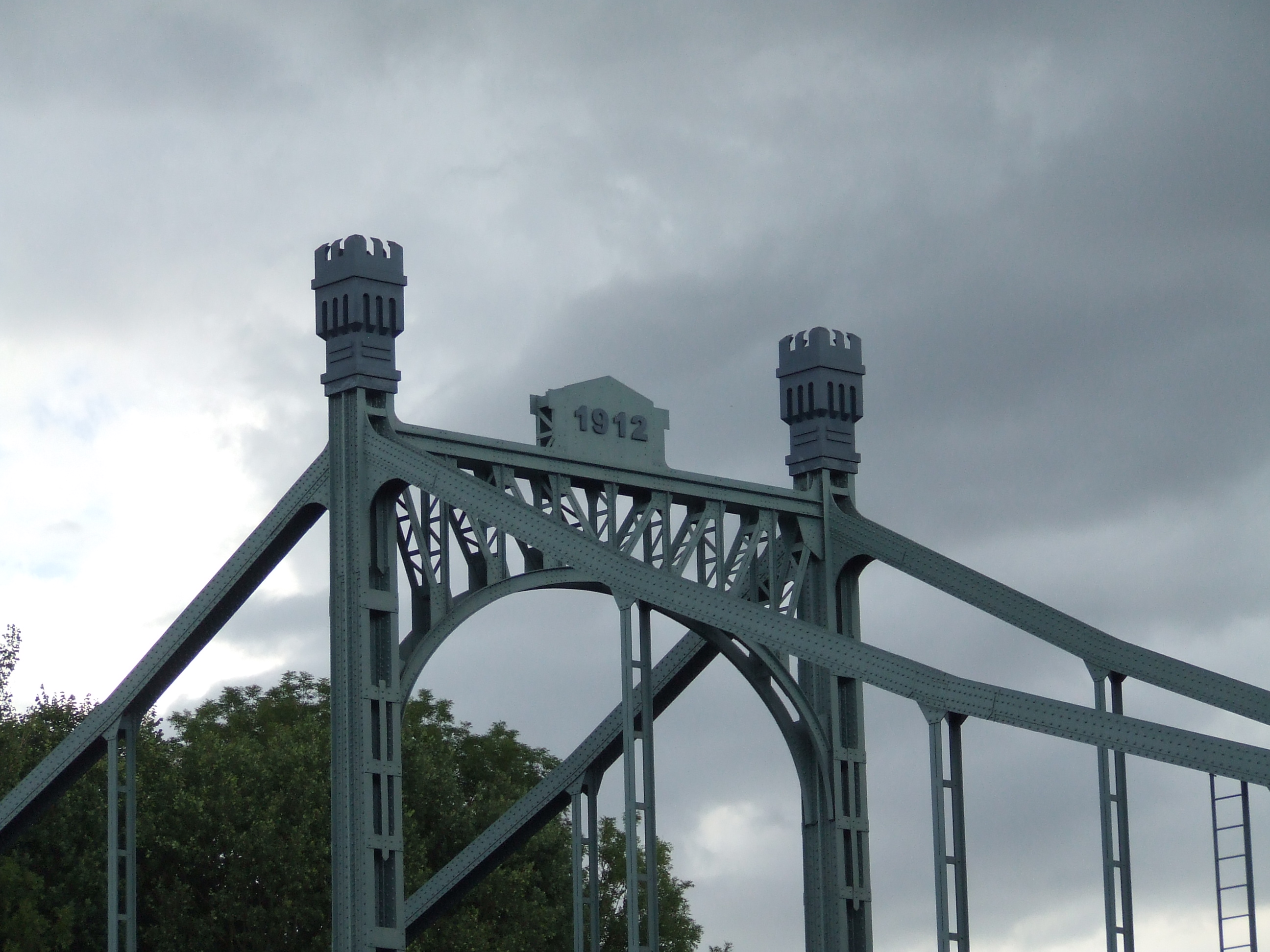 Štěpánský most (Obříství) - detail s rokem stavby